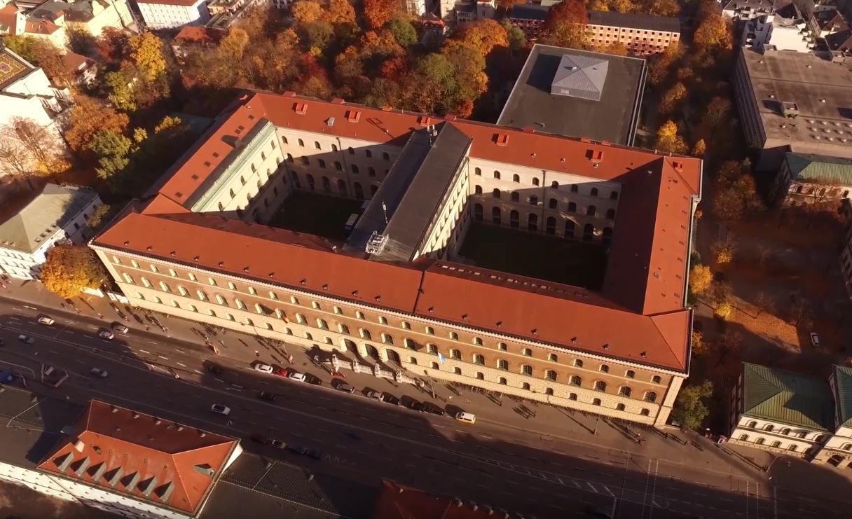 Das Gebäude der Staatsbibliothek